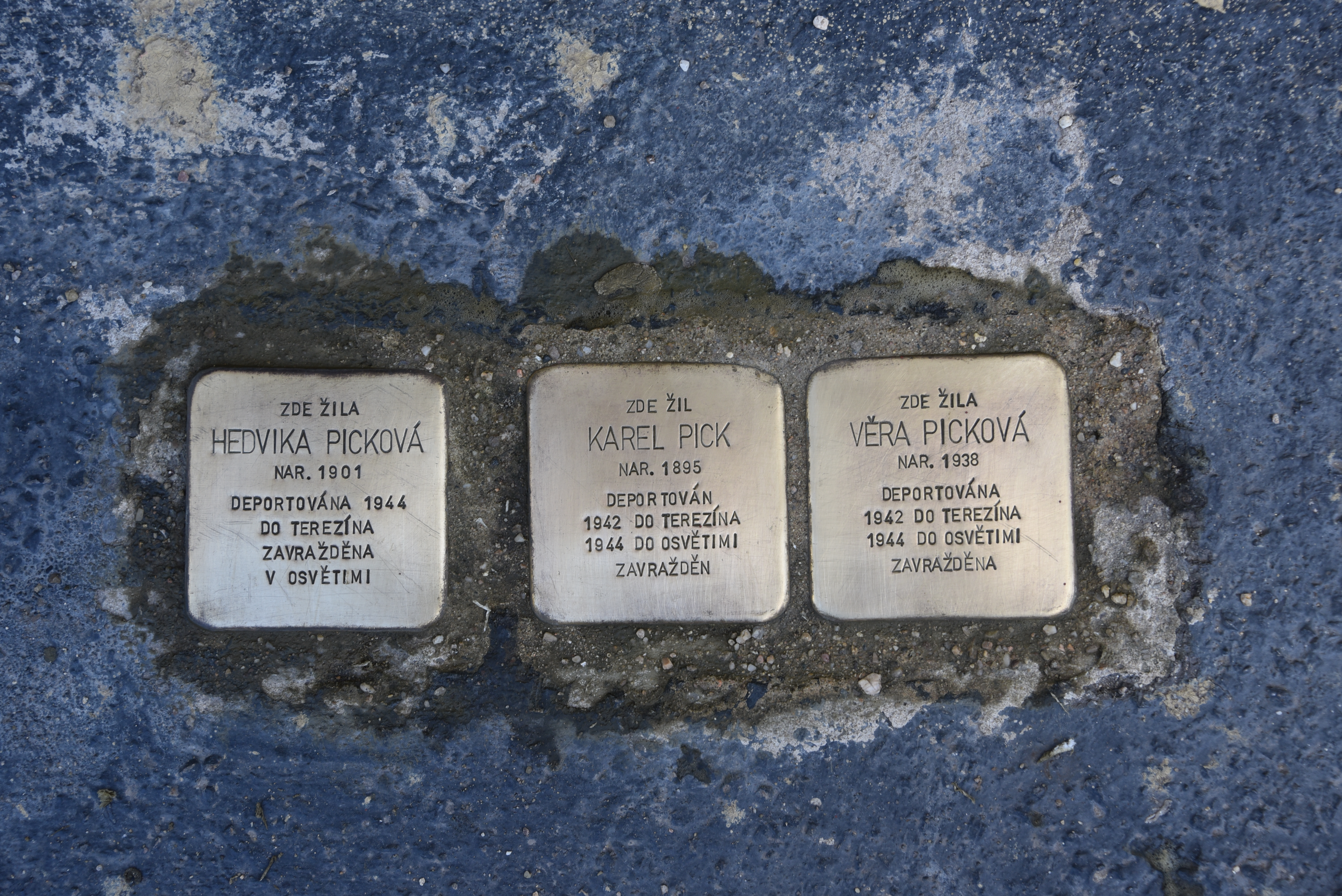 Stolpersteine für Familie Pick in Prague-Nusle, Lumírova 525/1